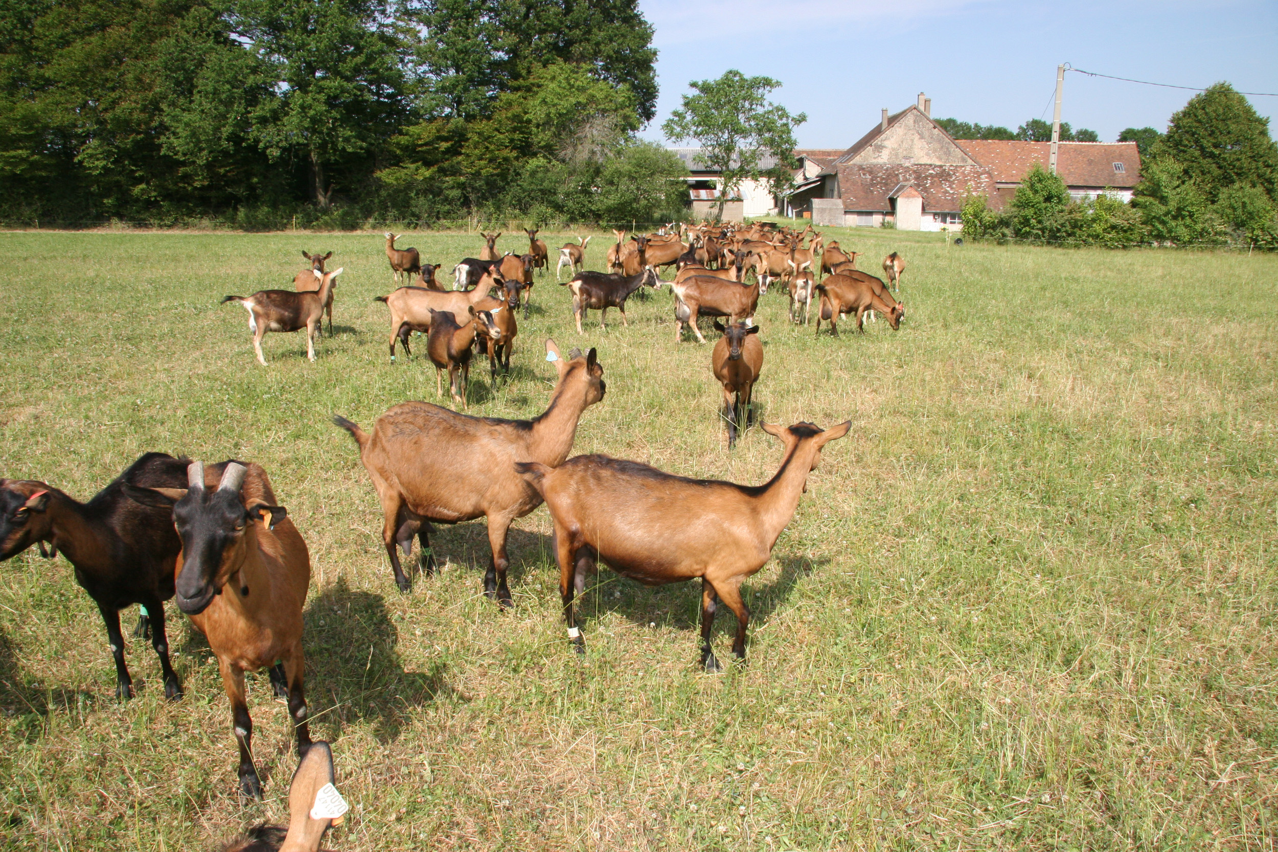 Chèvres de race alpine au pâturage en Région Centre